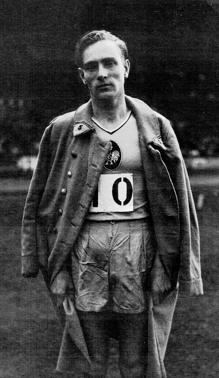 Keller (France), gagnant du 800 m plat : [photographie de presse] / Agence Mondial